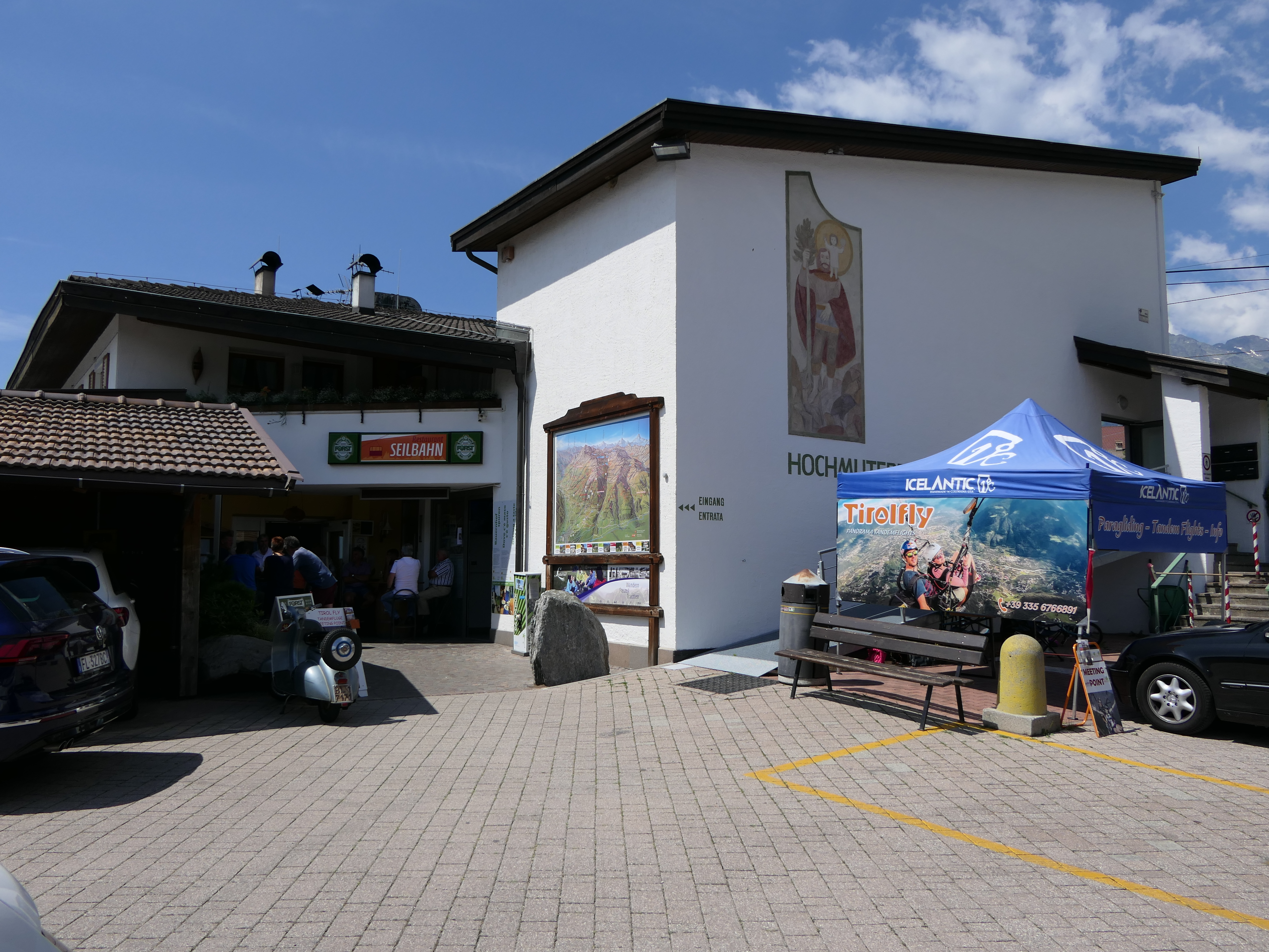 Talstation der Hochmuterbahn, einer Luftseilbahn hinauf zum Hochmut, in Dorf Tirol (oberhalb von Meran in Südtirol).